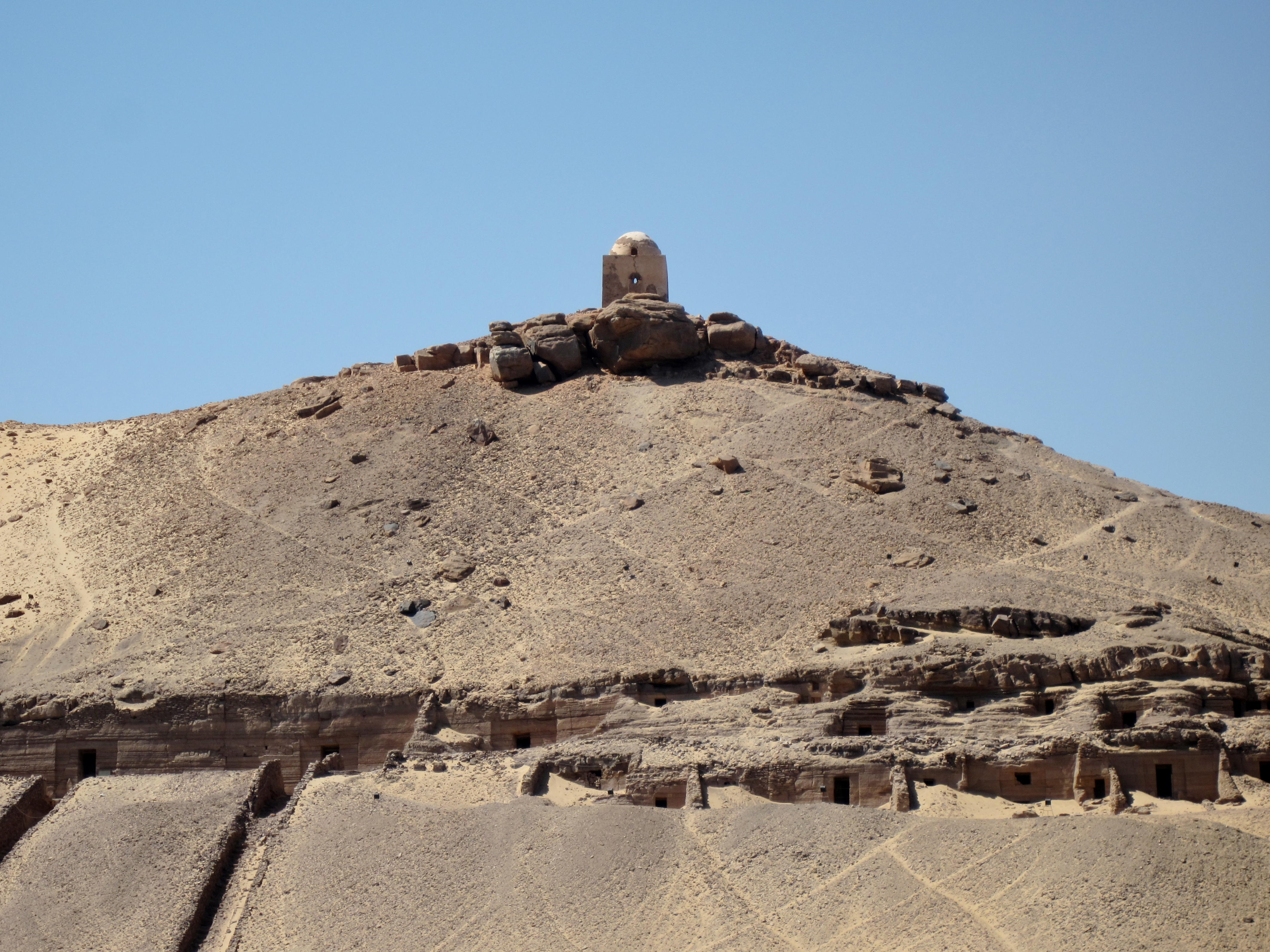 Westliches Nilufer bei Assuan, Ägypten